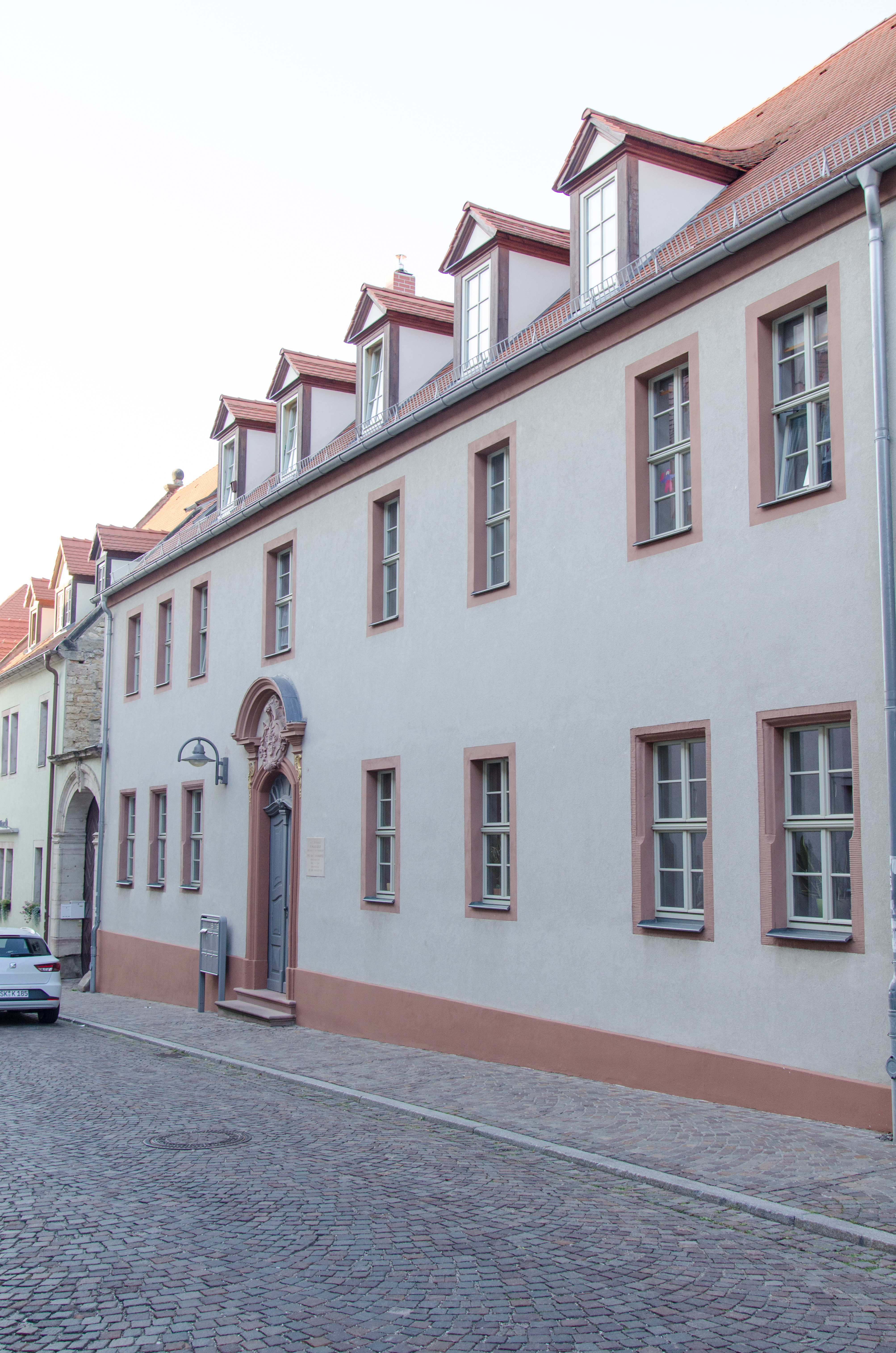 Querfurt, Nebraer Straße 11